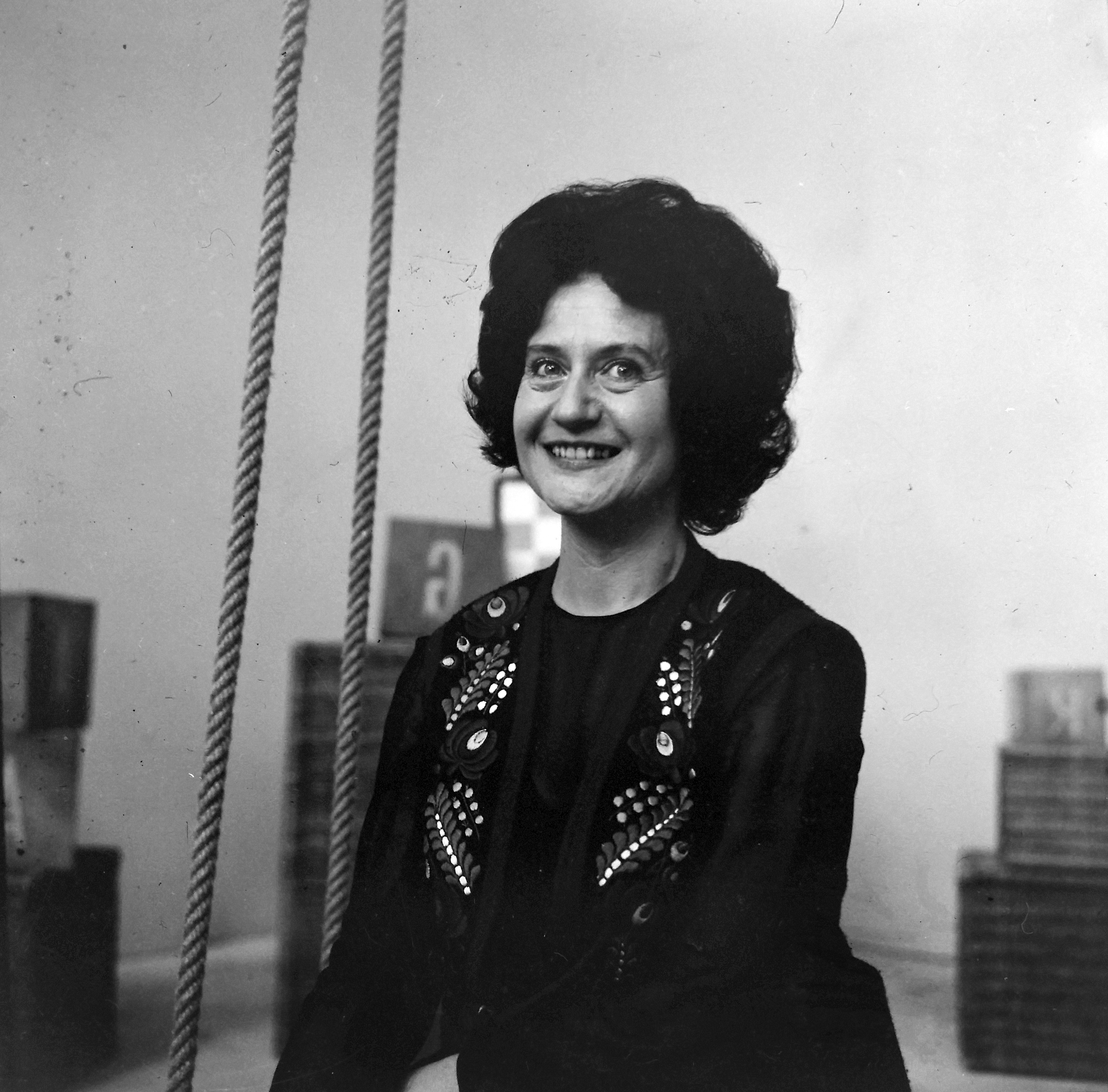 Vera Belogrlić (1926-2015), srpski reditelj.Foto Stevan Kragujević (po odobrenju kćerke Tanje Kragujević)